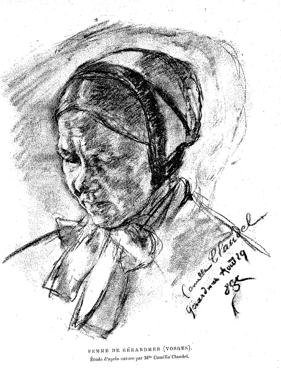 « Femme de Gérardmer (Vosges) », étude signée « Camille Claudel, Août 29, [18]85 », parue dans Revue universelle illustrée, Paris, 1889, tome 4, page 107.